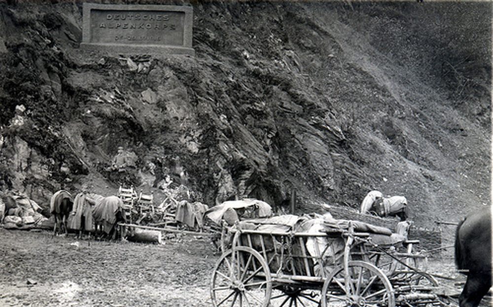 Echipament abandonat de trupele romane in pasul Turnu Rosu (România) - 1916